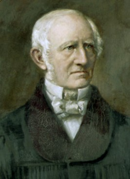 Elisabeth Strempel: Porträt Johannes Roeper, Universitätsarchiv Rostock